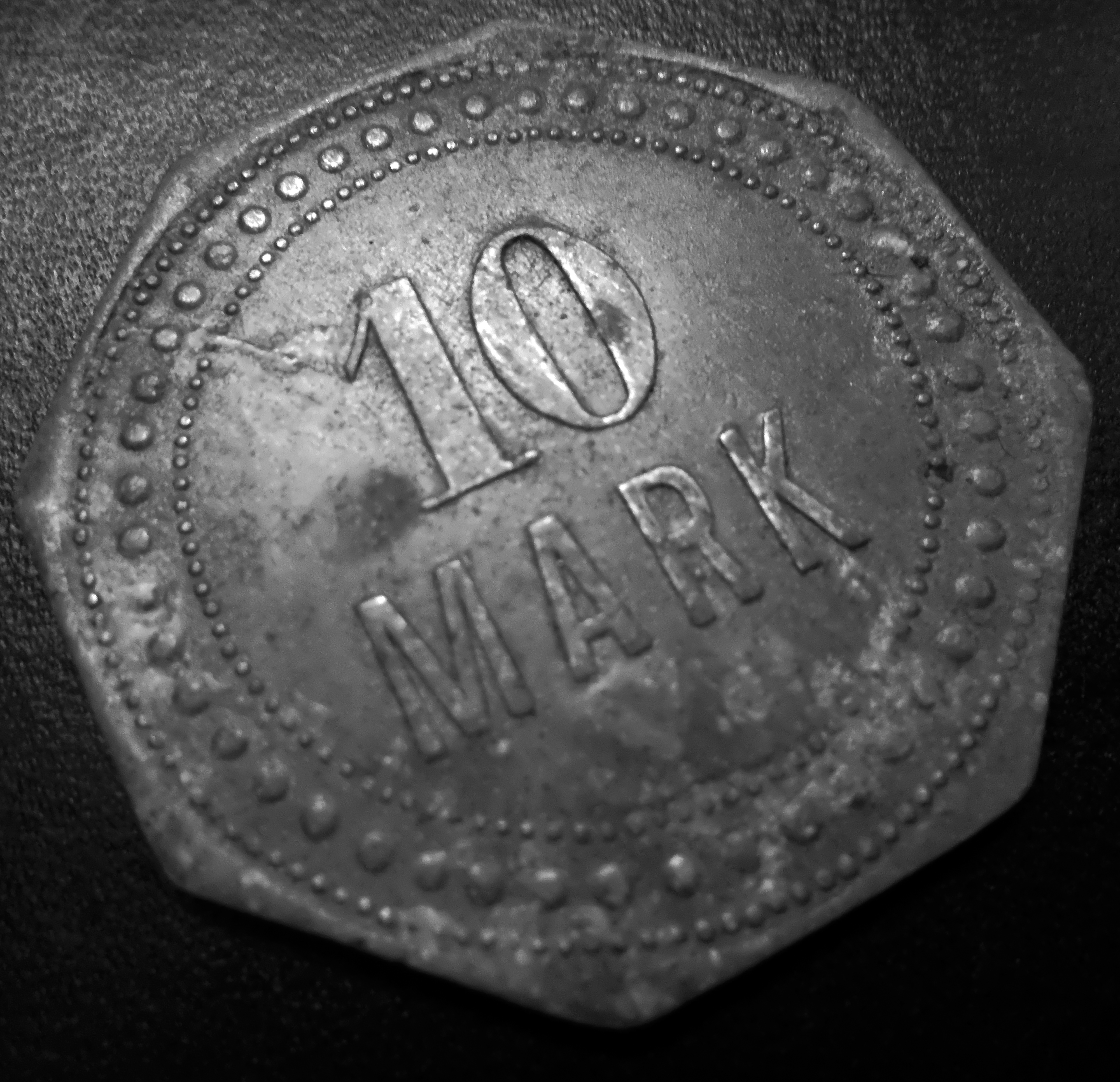 10 Mark Wertmarke aus Dresden